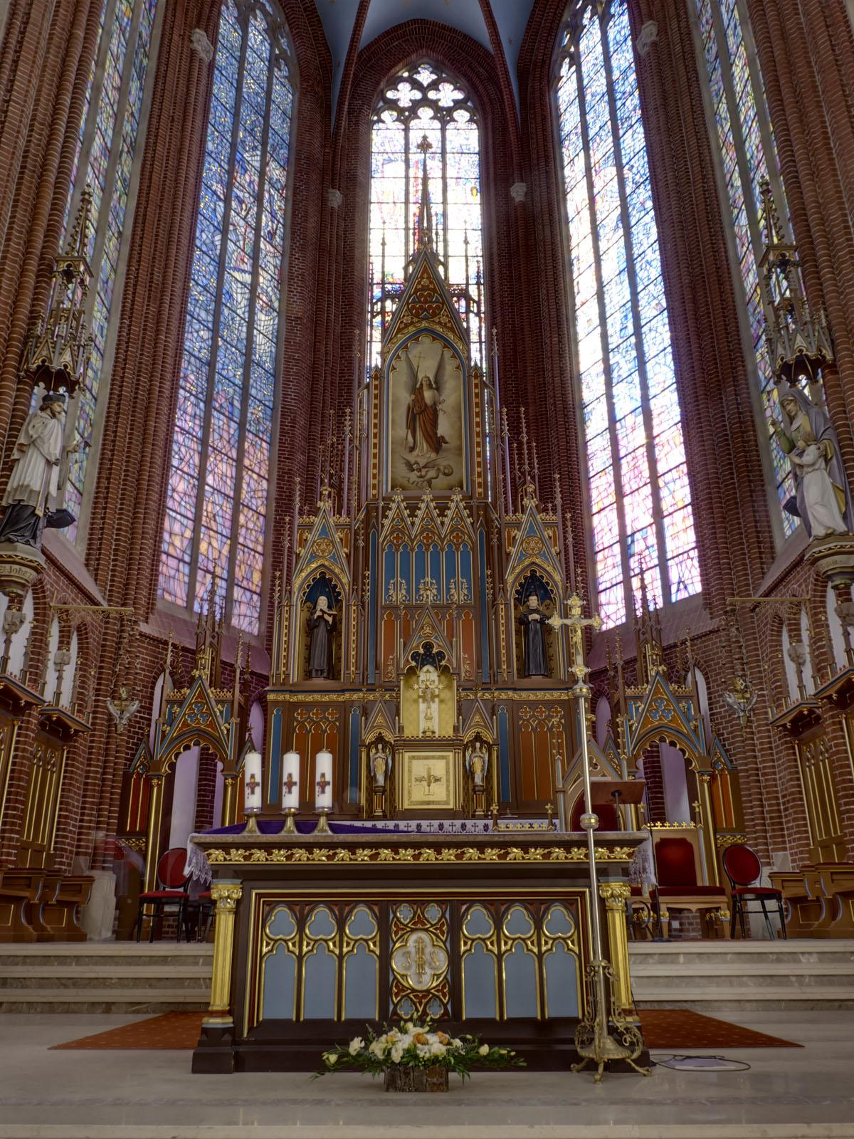 Wrocław, Kościół Św. Michała - ołtarz i witraż (A/2493/352/Wm)